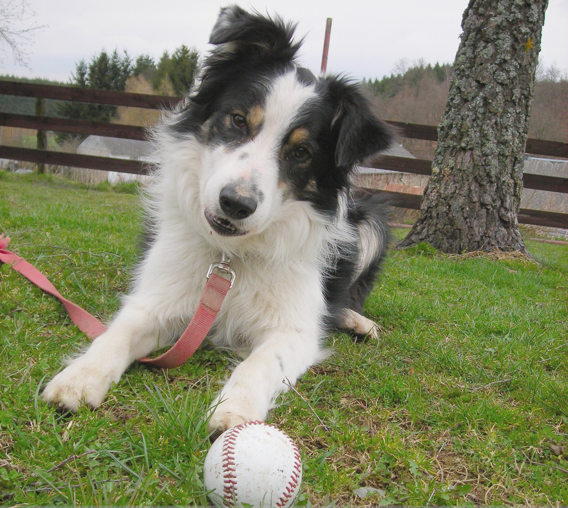 Description: Border Collie Male âgé de 2 ans Source